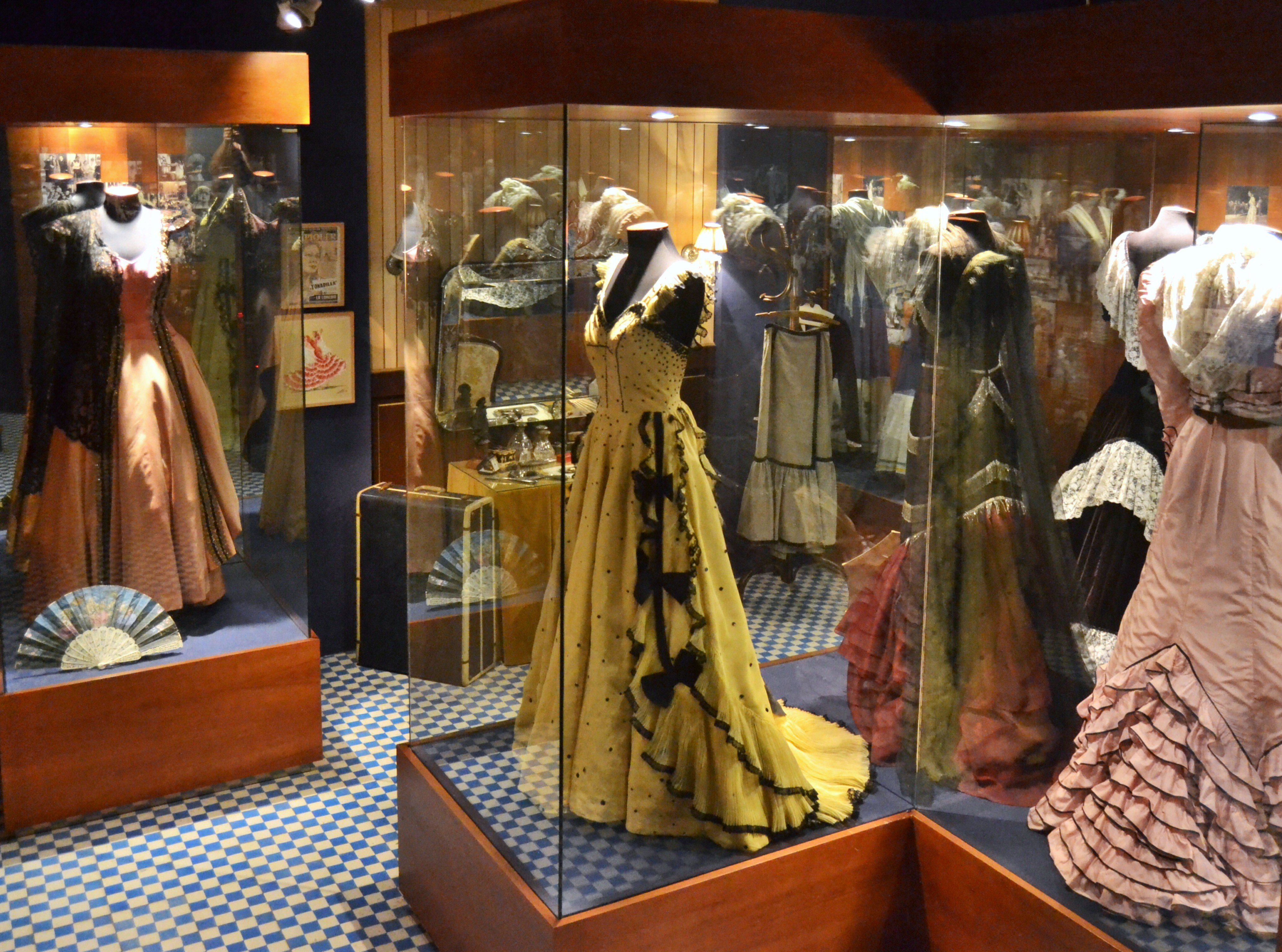 Casa-Museu Concha Piquer, vestits.